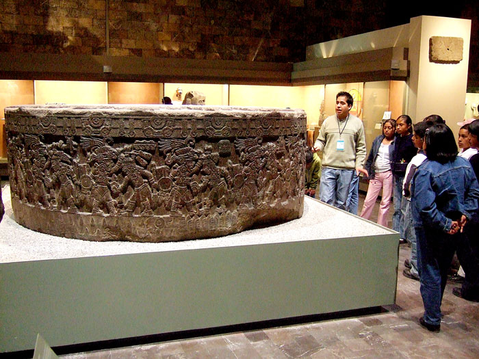 Piedra de Tízoc original Museo Nacional de Antropología e Historia, Mexico City